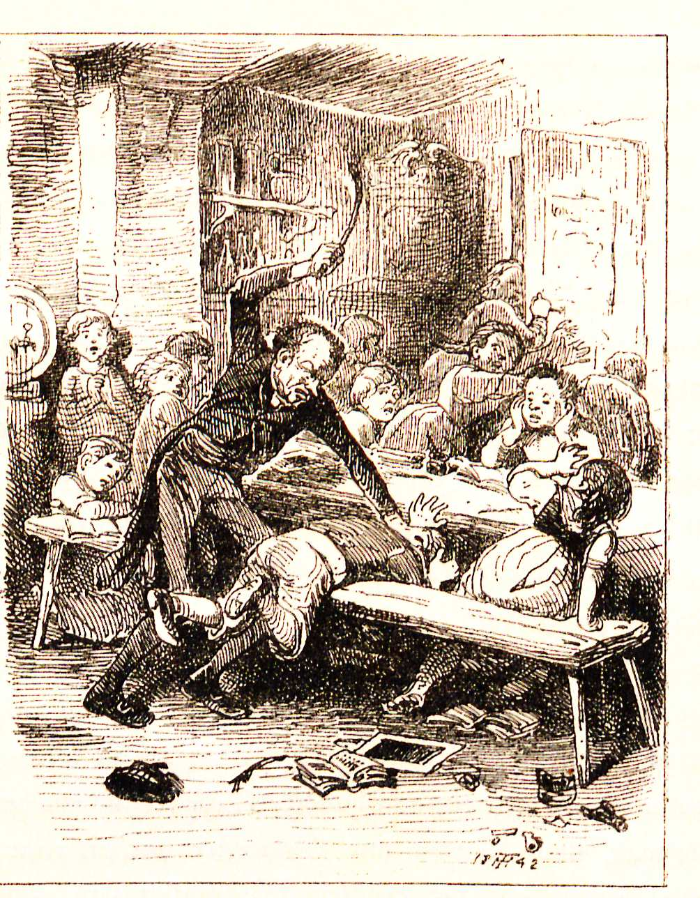 Theodor Hosemann Prügelstrafe 1842